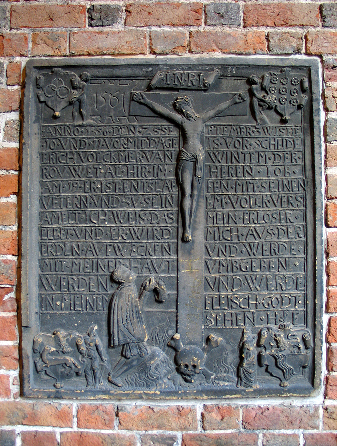 Epithaph für den 1561 verstorbenen Erich Volckmer van Wintheim in der Turmhalle der Marktkirche ...